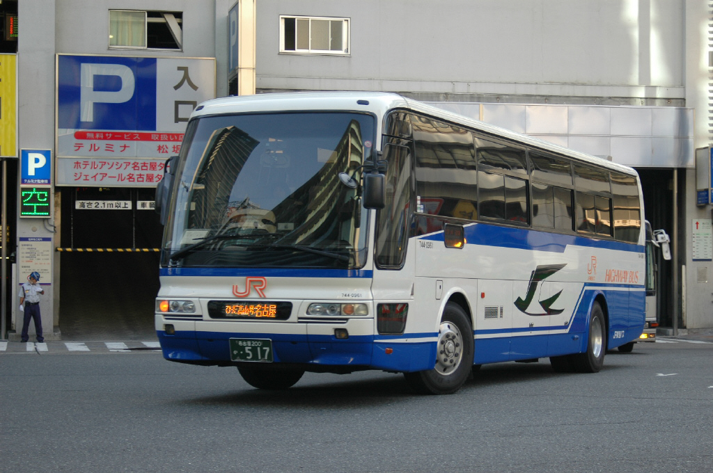 旧名古屋バスセンター